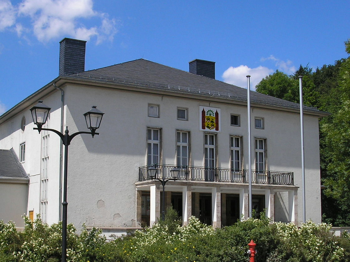 Die Festhalle in Ilmenau (Thüringen).